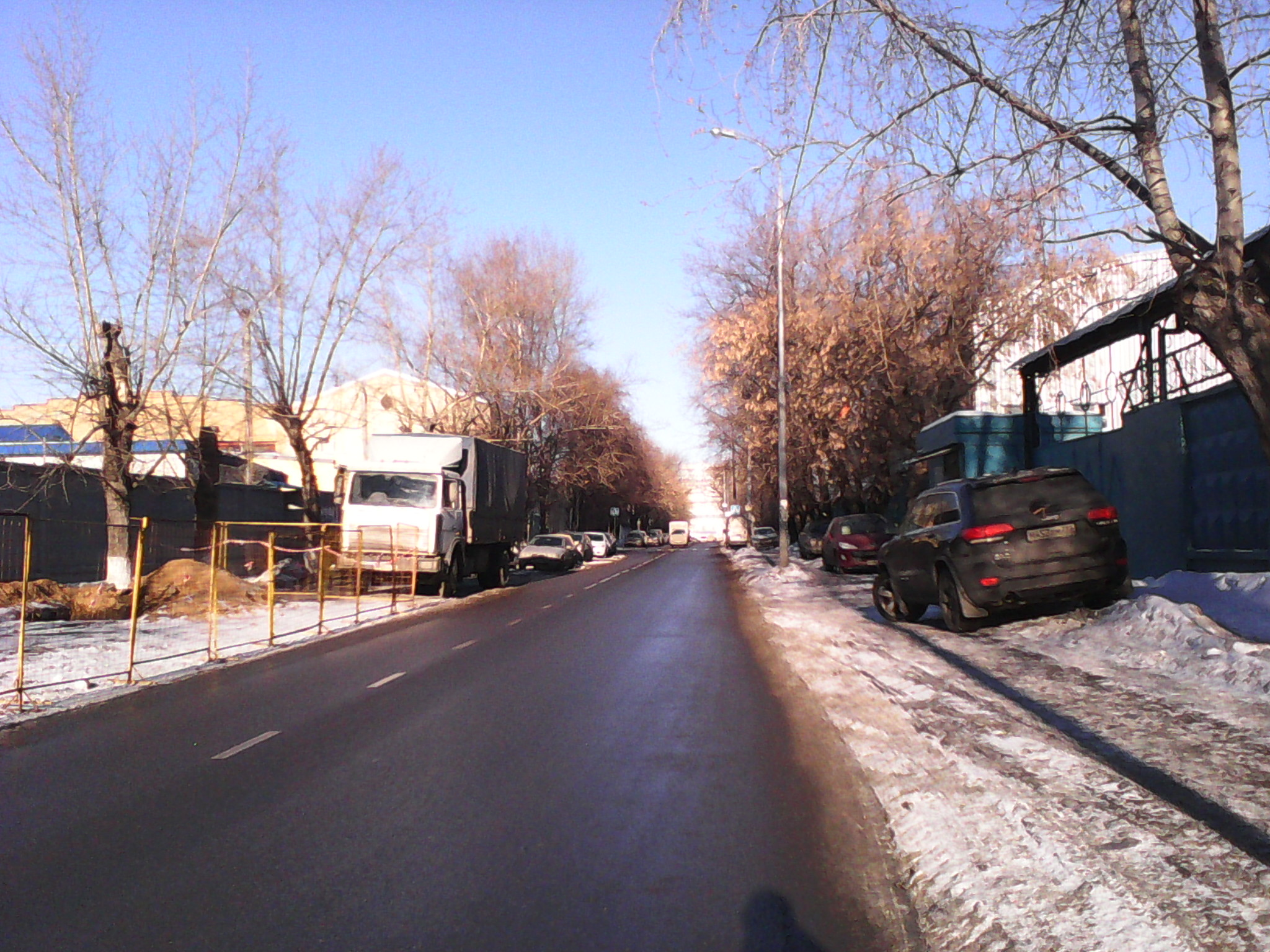 Вид Стахановской улицы в сторону Рязанского просекта. Февраль 2015 года